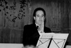 Filiberto Ricciardi, concerto di musica sacra Chiesa di Lourdes Villafranca Tirrena (ME)- 1993 autore foto: Francesco Venuto licenza